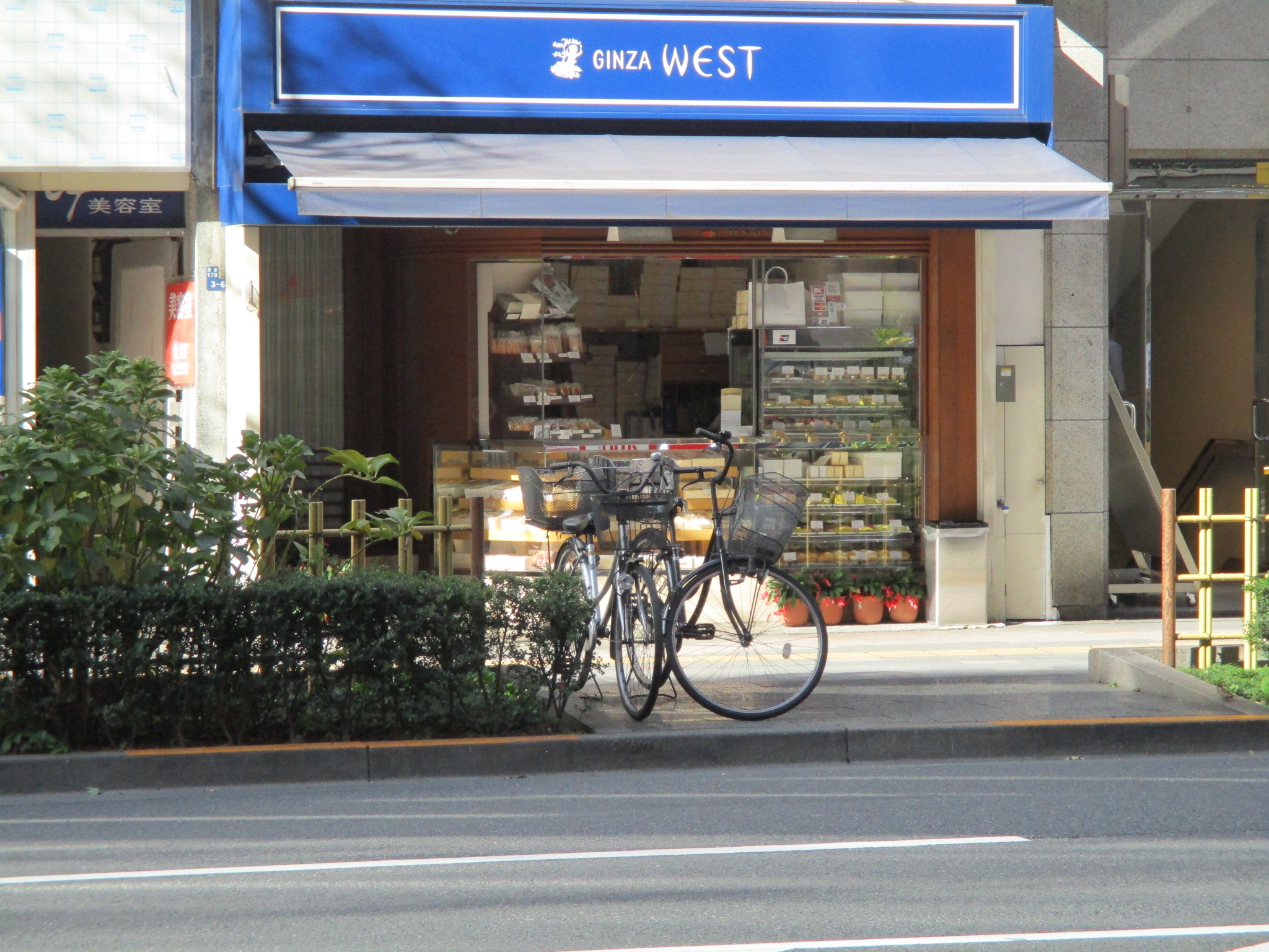 銀座 ウエスト本店